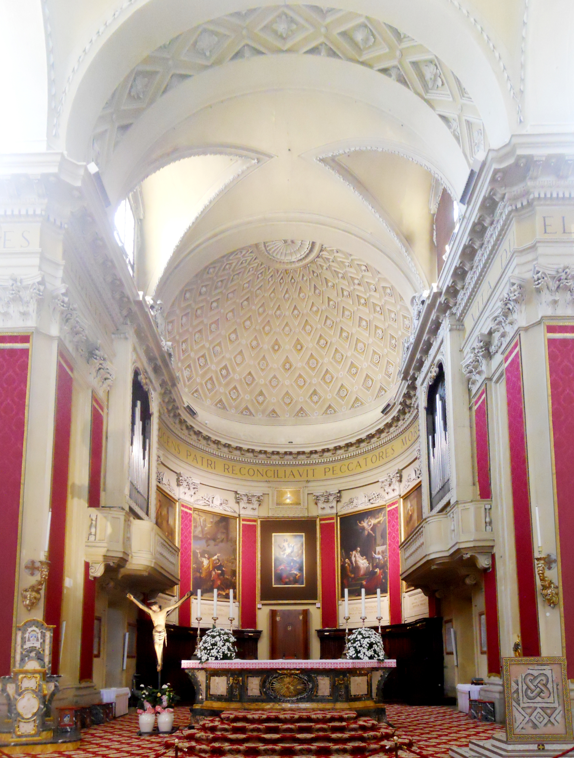 Interno dell'abside e del presbiterio del duomo di Ravenna.